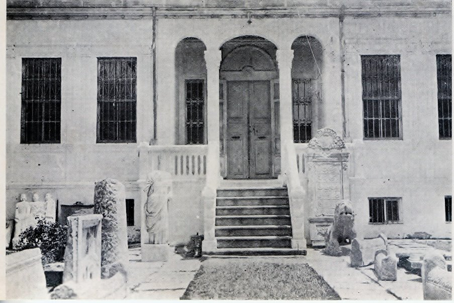 Borluoğlu Konağı ile Namık Kemal Anadolu Lisesinin yanındaki alanda yer alan eski Samsun Müzesi binası.